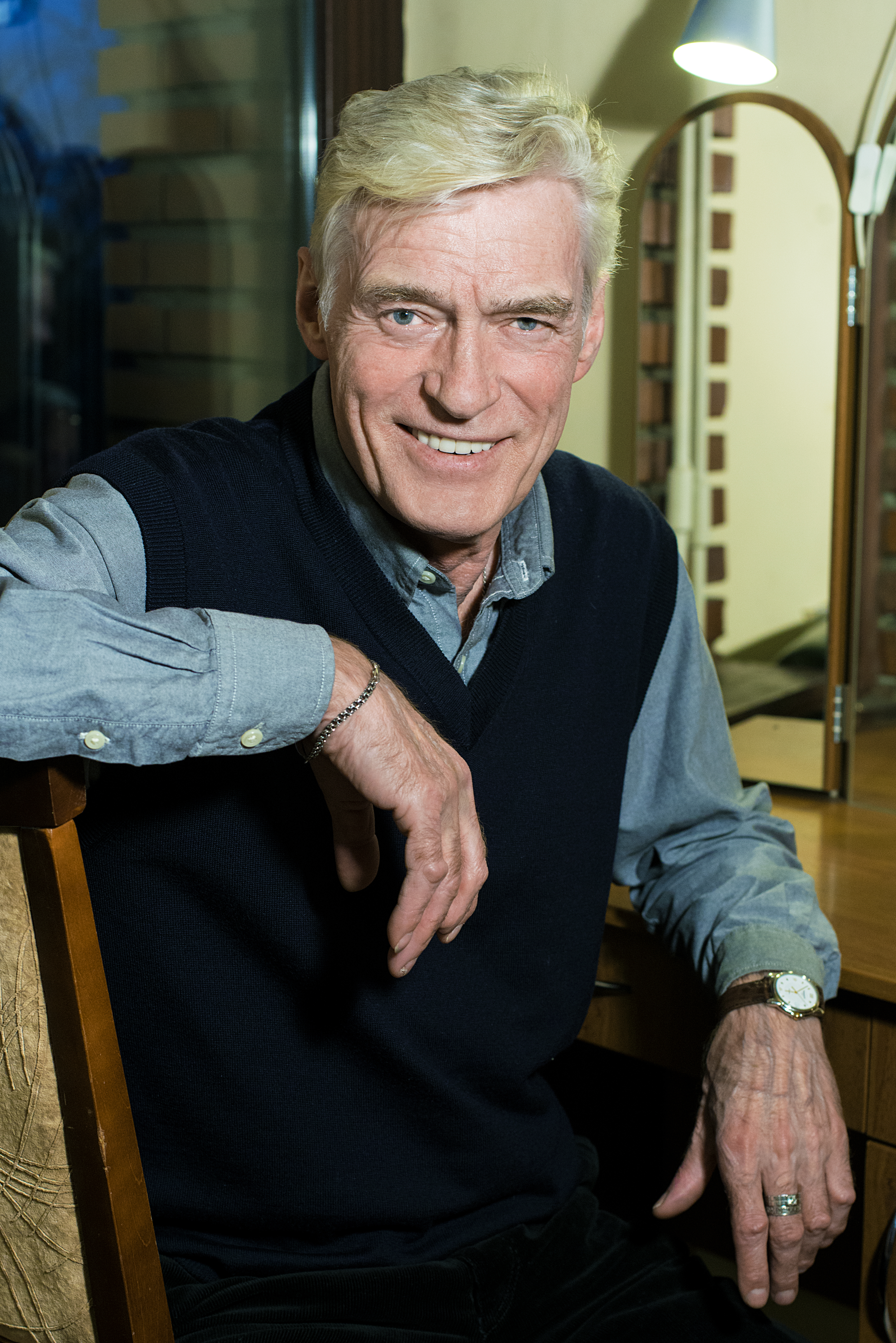 Щербаков Борис Васильевич